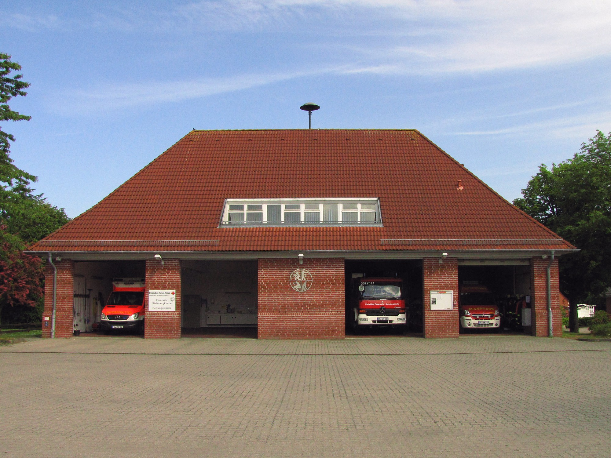 Freiwillige Feuerwehr und DRK Rettungswache - modernes Einsatzzentrum mit den in Steinbergkirche stationierten Rettungsfahrzeugen - Angeln Kreis Schleswig-Flensburg Foto Wolfgang Pehlemann Steinberg IMG_7211